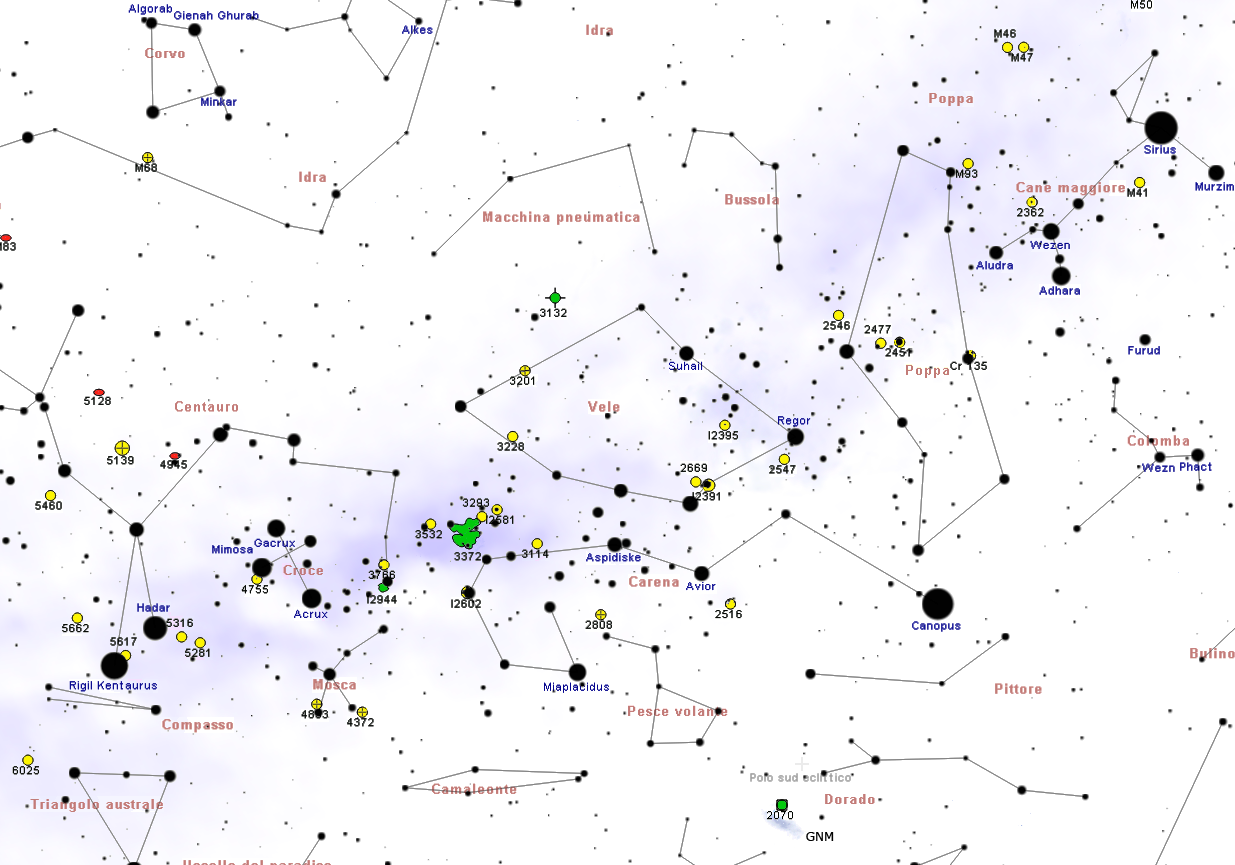 Esempio di mappa celeste moderna